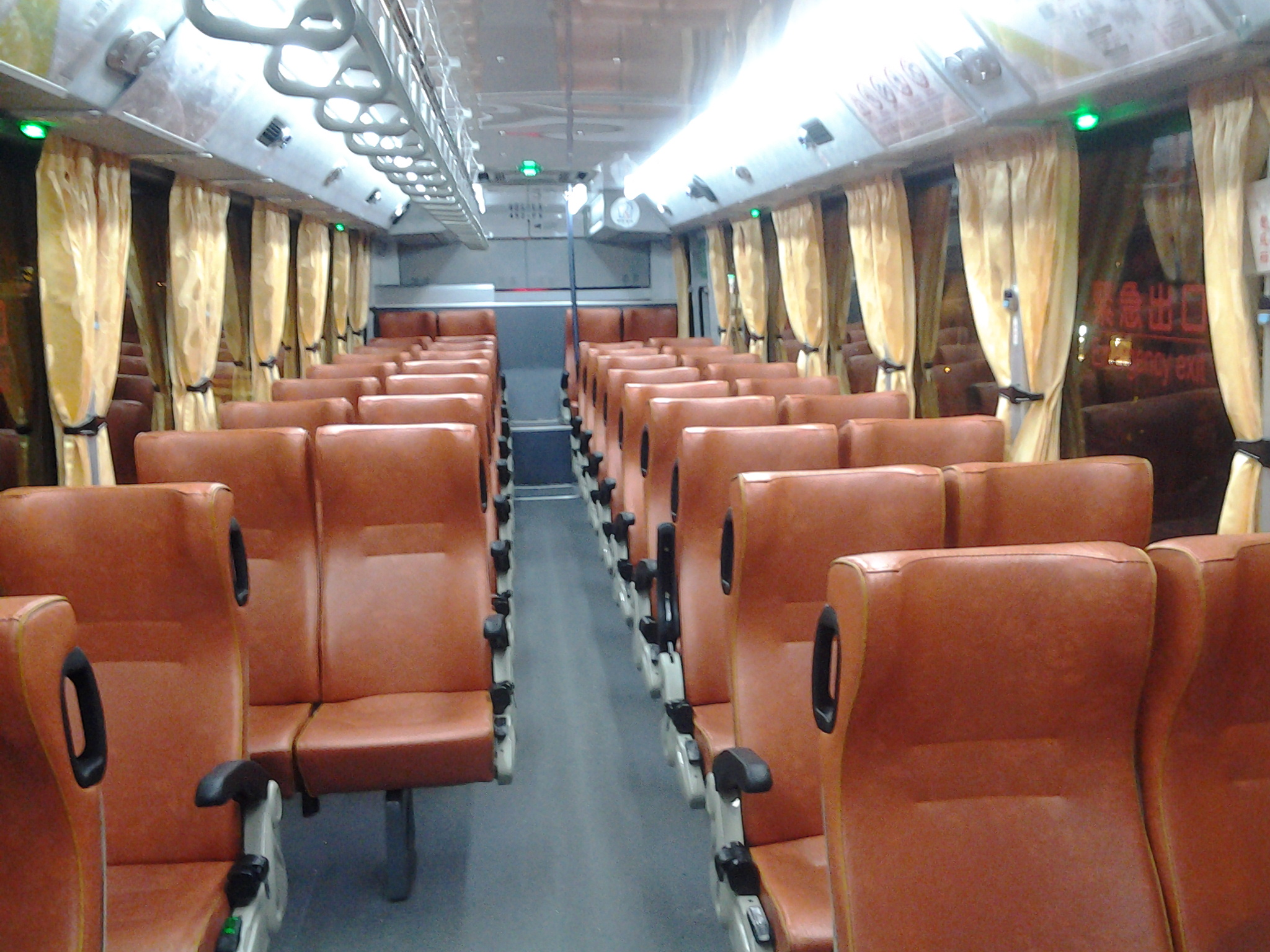 台中客運 2012〈2012〉 HINO RK8JRSA（馨盛）內裝